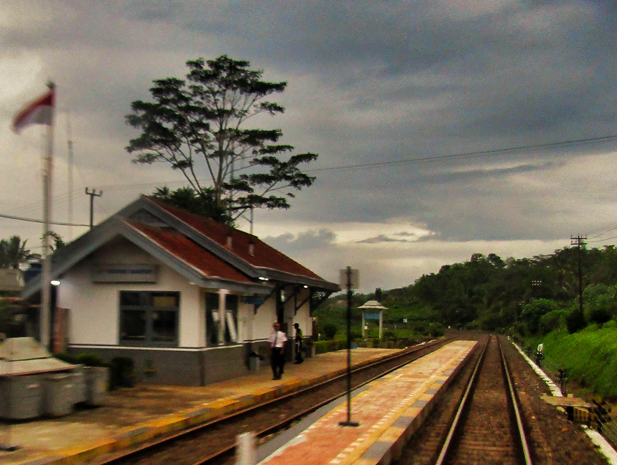 Bangunan Stasiun Warungbandrek 2020